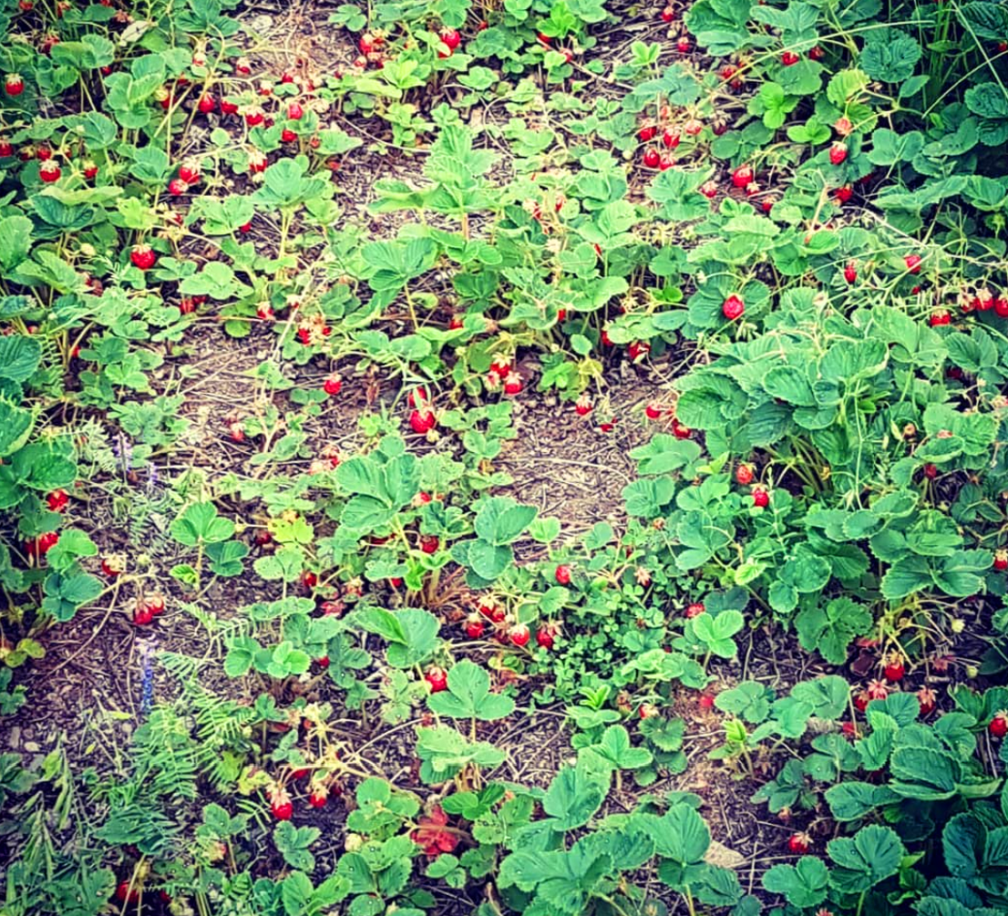 Garden strawberries. Eastern Siberia